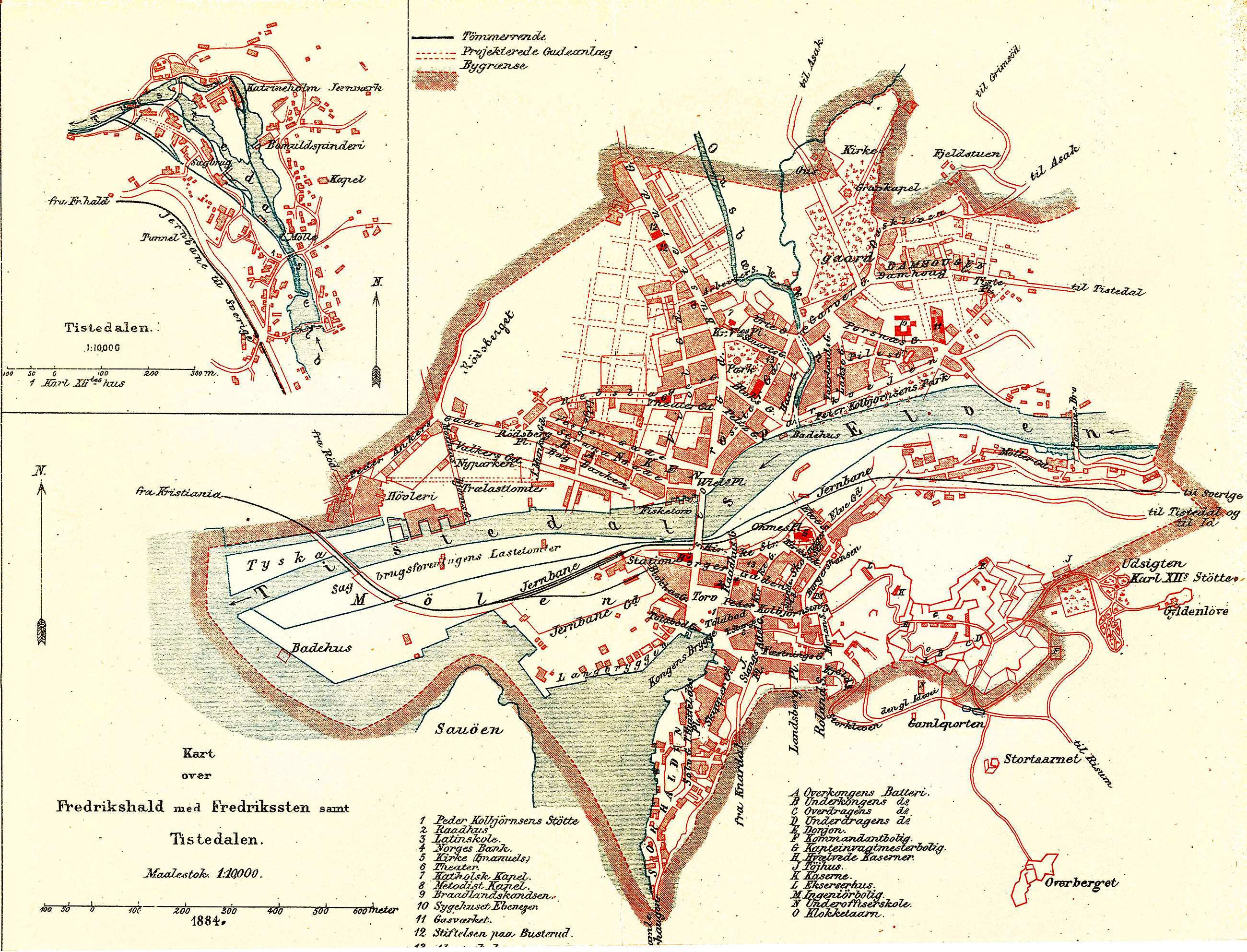 Kart over Halden og Tistedal, 1884.